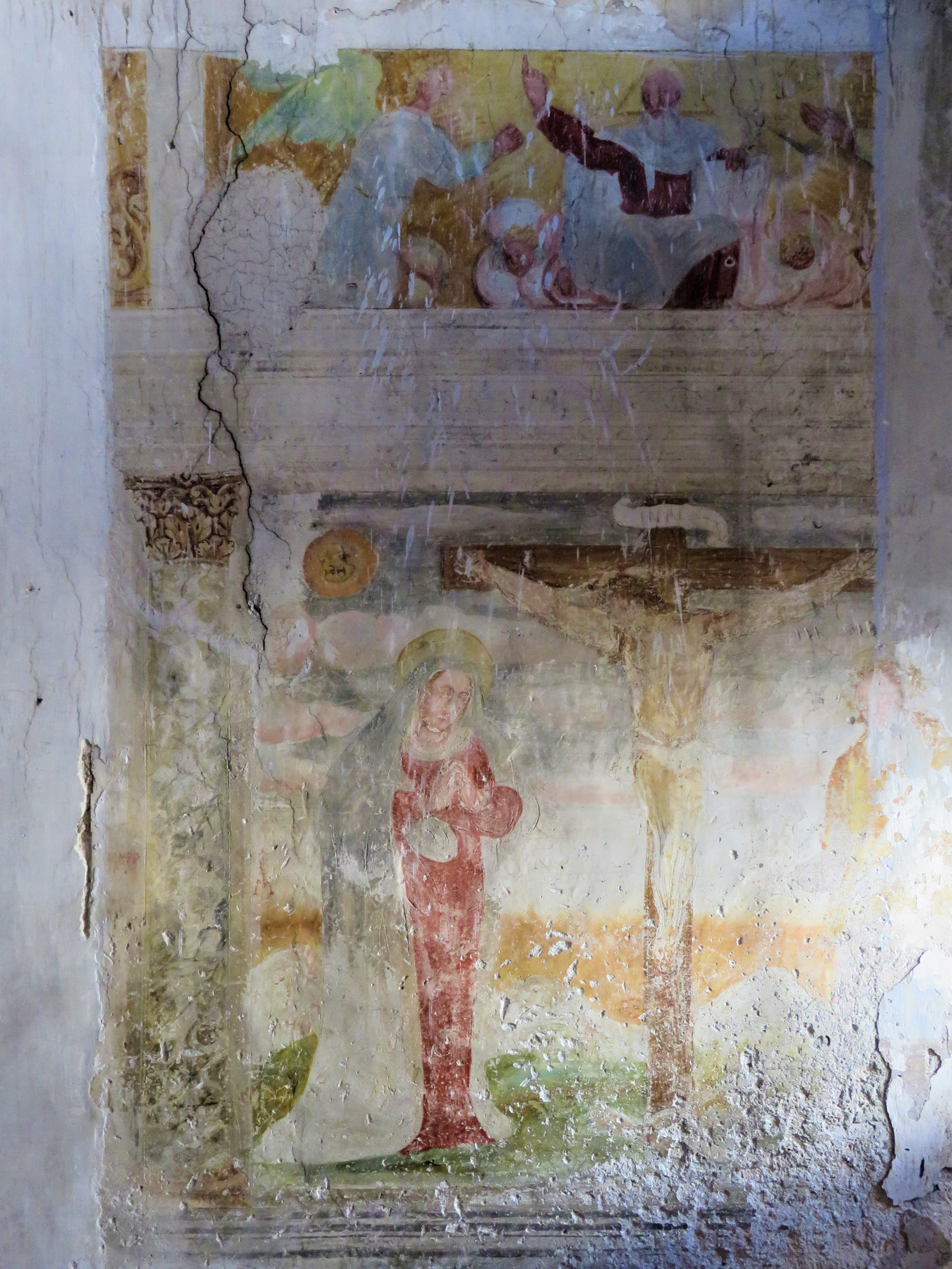 Cappella di Santa Barbara - Isera. Lacerto di affreschi cinquecenteschi